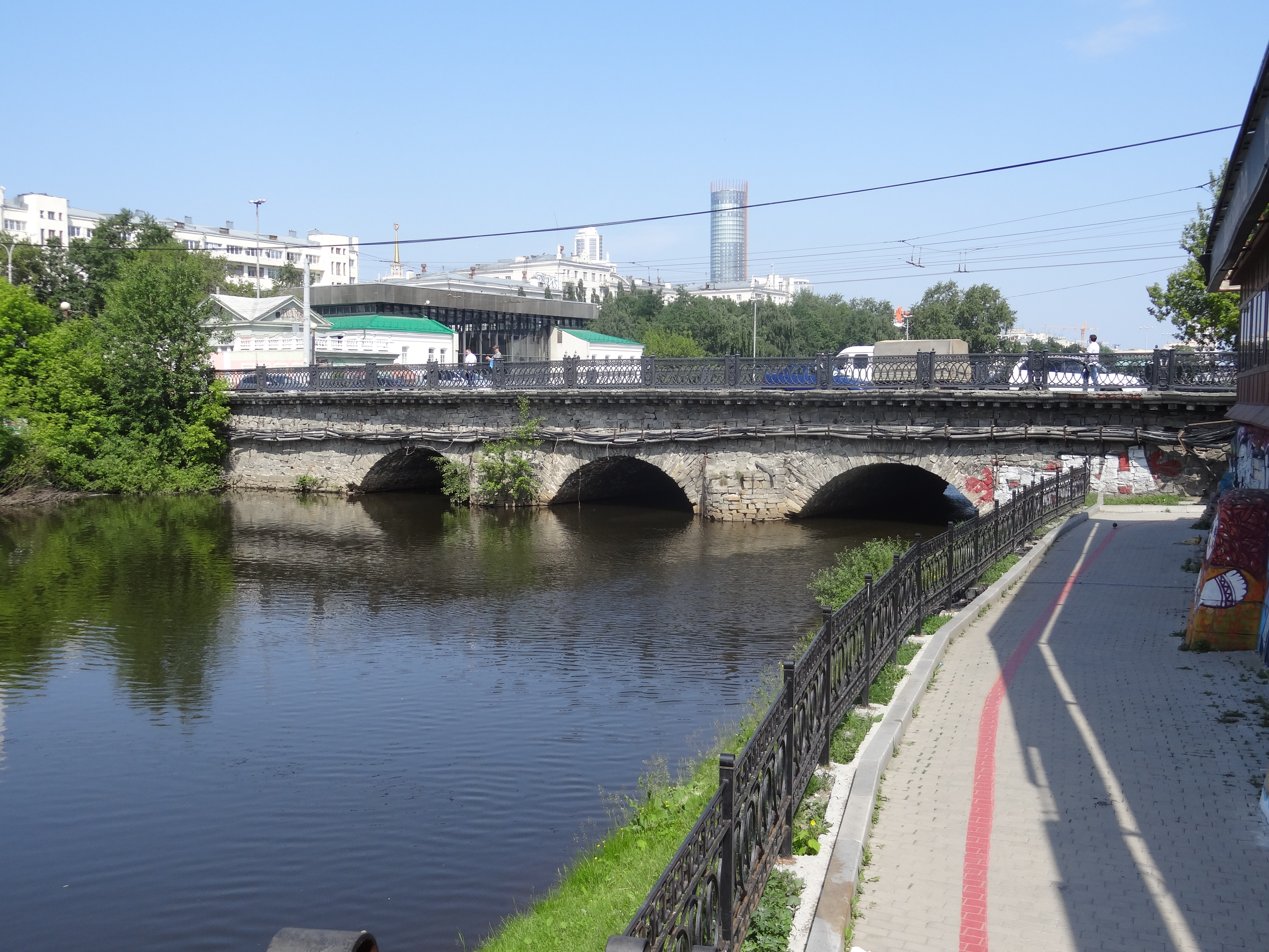 Каменный мост по улице Малышева в Екатеринбурге